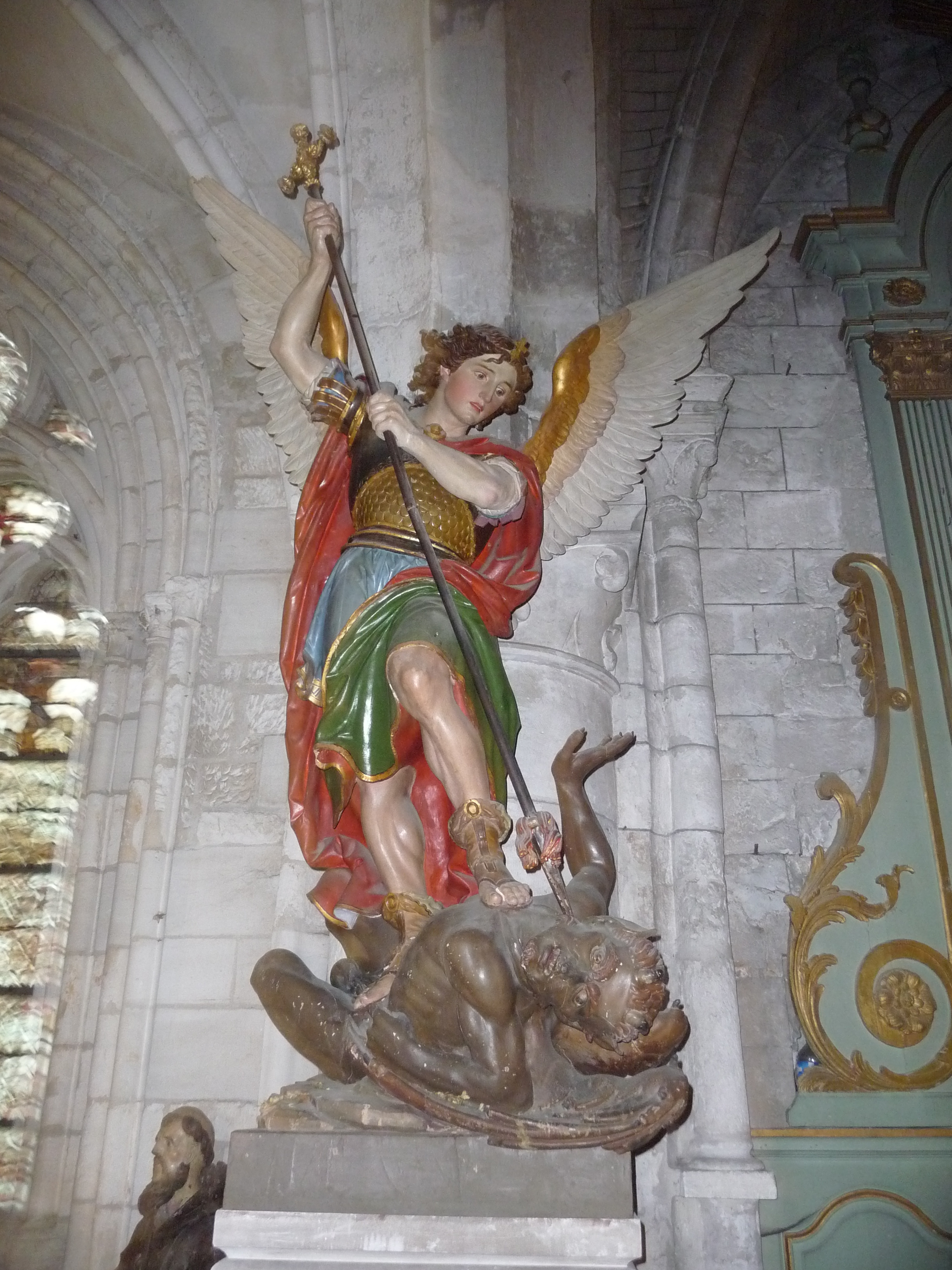 intérieur